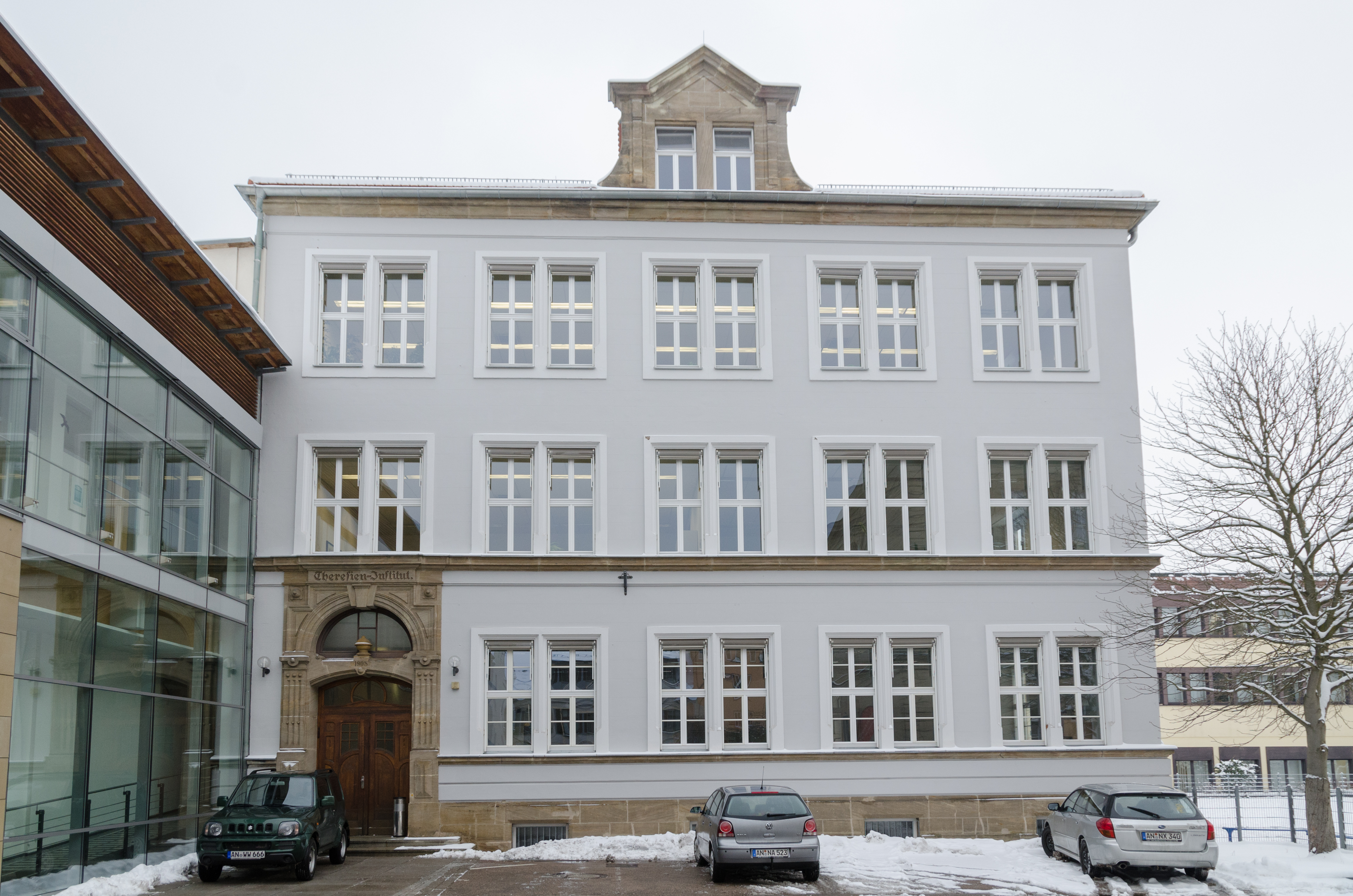 Karolinenstraße 25a